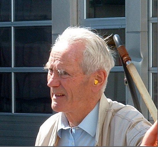 Wilhelm Mohr i forbindelse med test av Sikorsky S-92 på Sola lufthavn